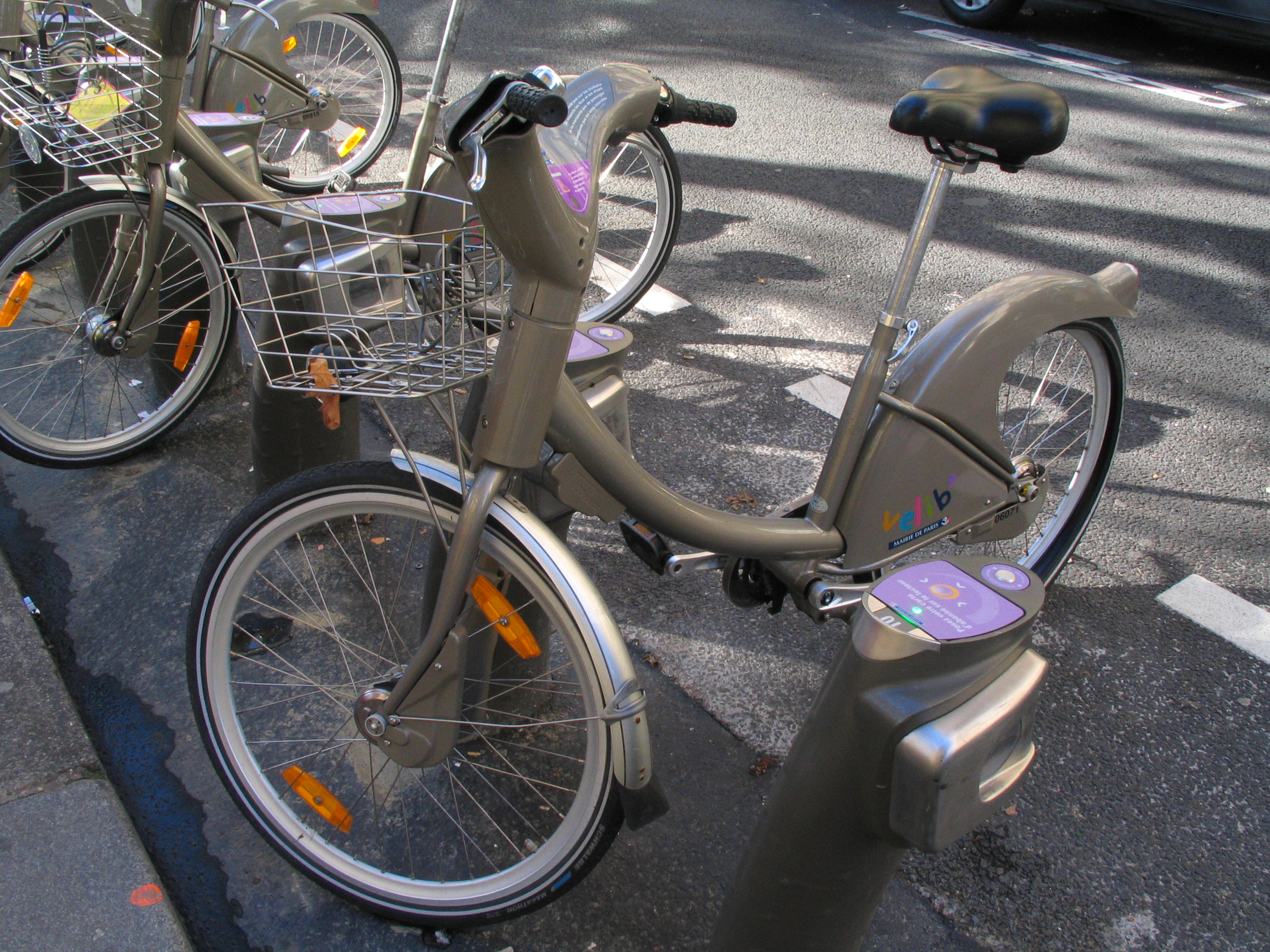 Velib', métro Courcelles, Paris